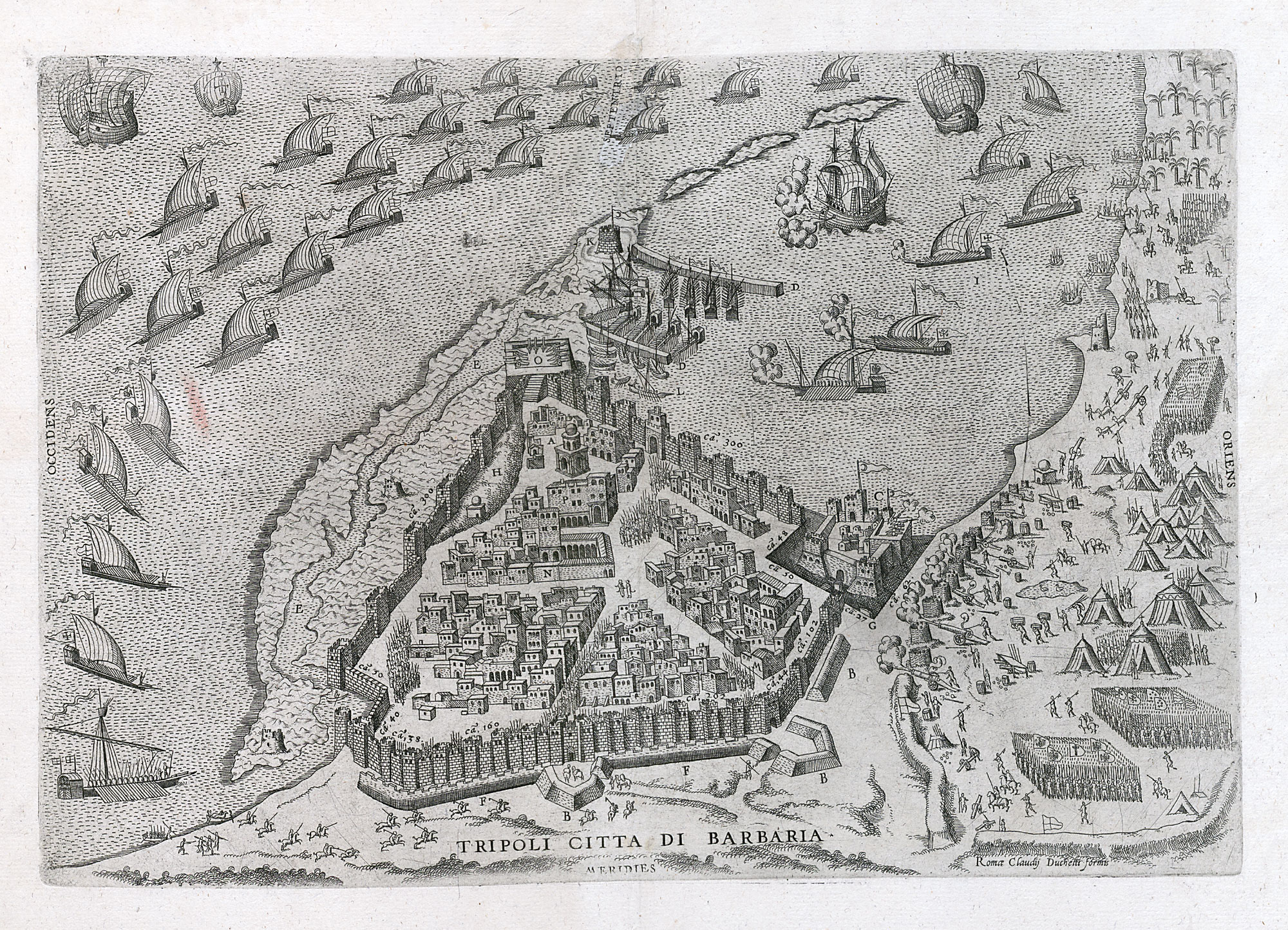 Tripoli città di Barbaria; Kupferstich, um 1570